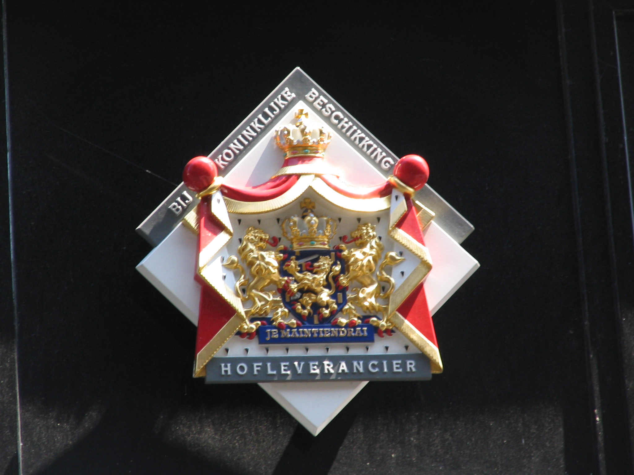 Hoflieferant, Den Haag